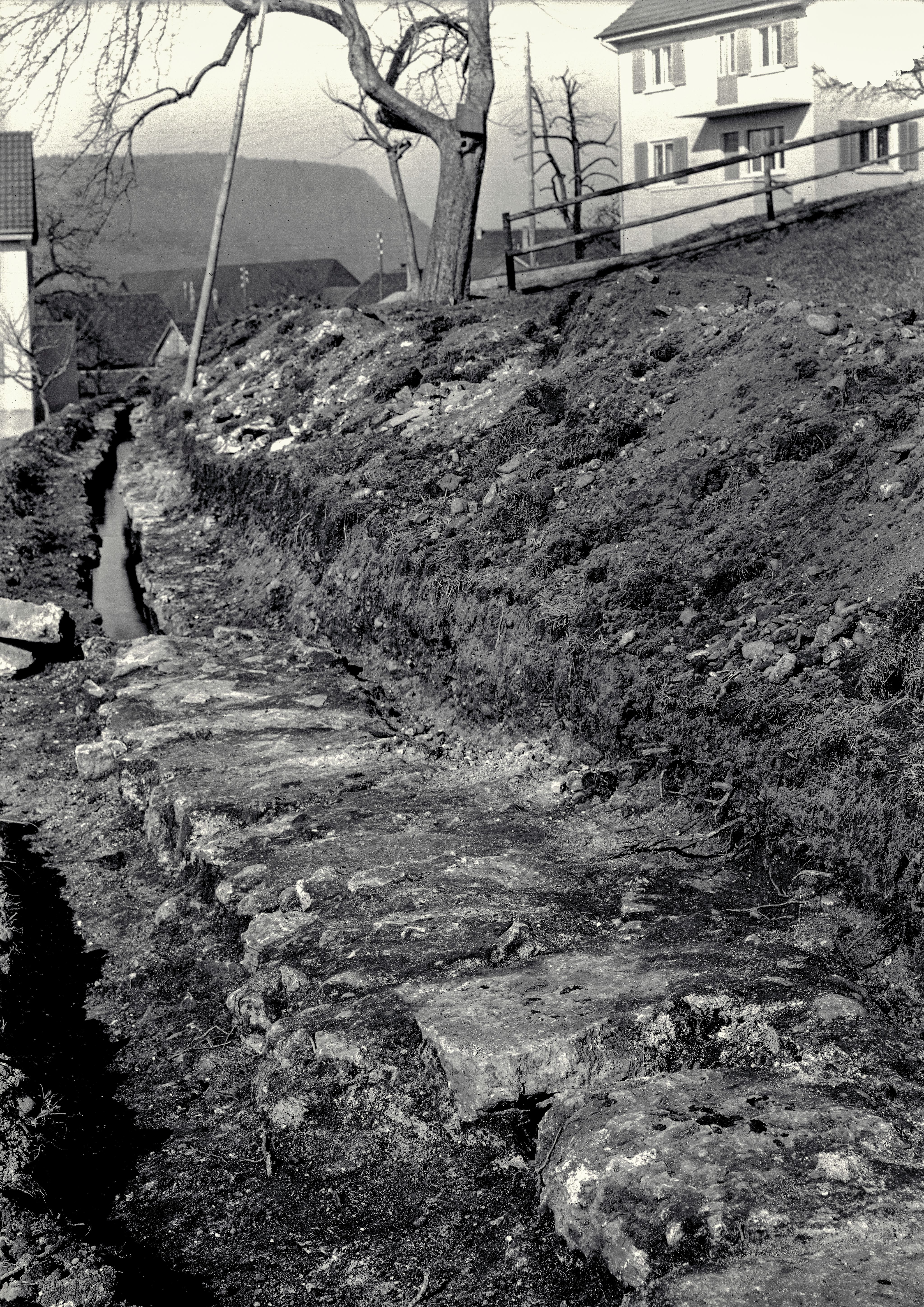 Archiv der Kantonsarchäologie Aargau Objekt: Wasserführende römische / mittelalterliche Wasserleitung von Vindonissa Ort: Windisch, Oberburg Datierung: 1. Jh. n. Chr. Aufnahmedatum: März 1935 Beschreibung: Blick von Süden auf die streckenweise abgedeckte römische/mittelalterliche Wasserleitung in einem damals kaum bebautem Areal von Windisch-Oberburg. Im Hintergrund rechts das Haus Wagnerhof 5.